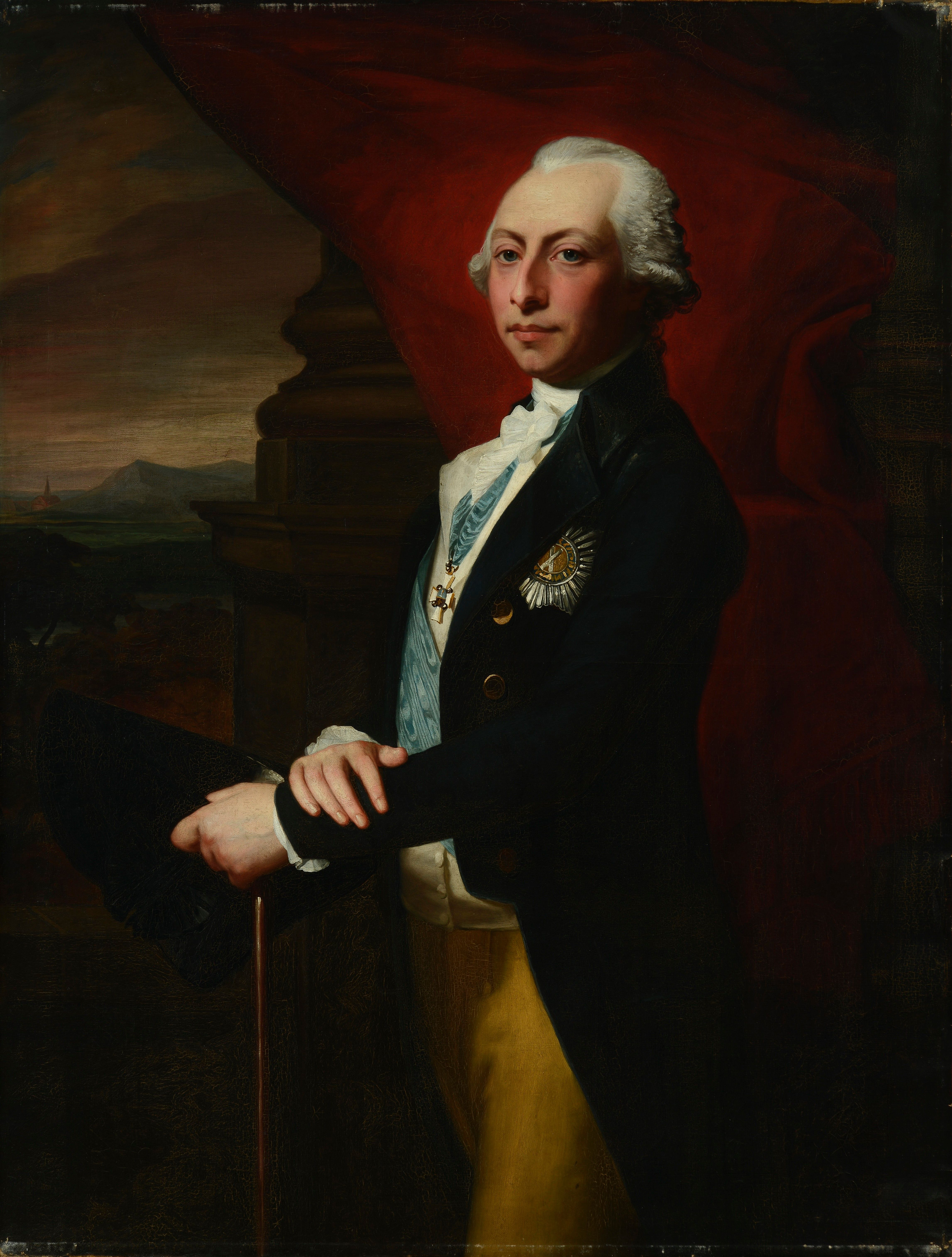 Objektsuche nach Portrait des Herzogs Peter Friedrich Ludwig von Oldenburg